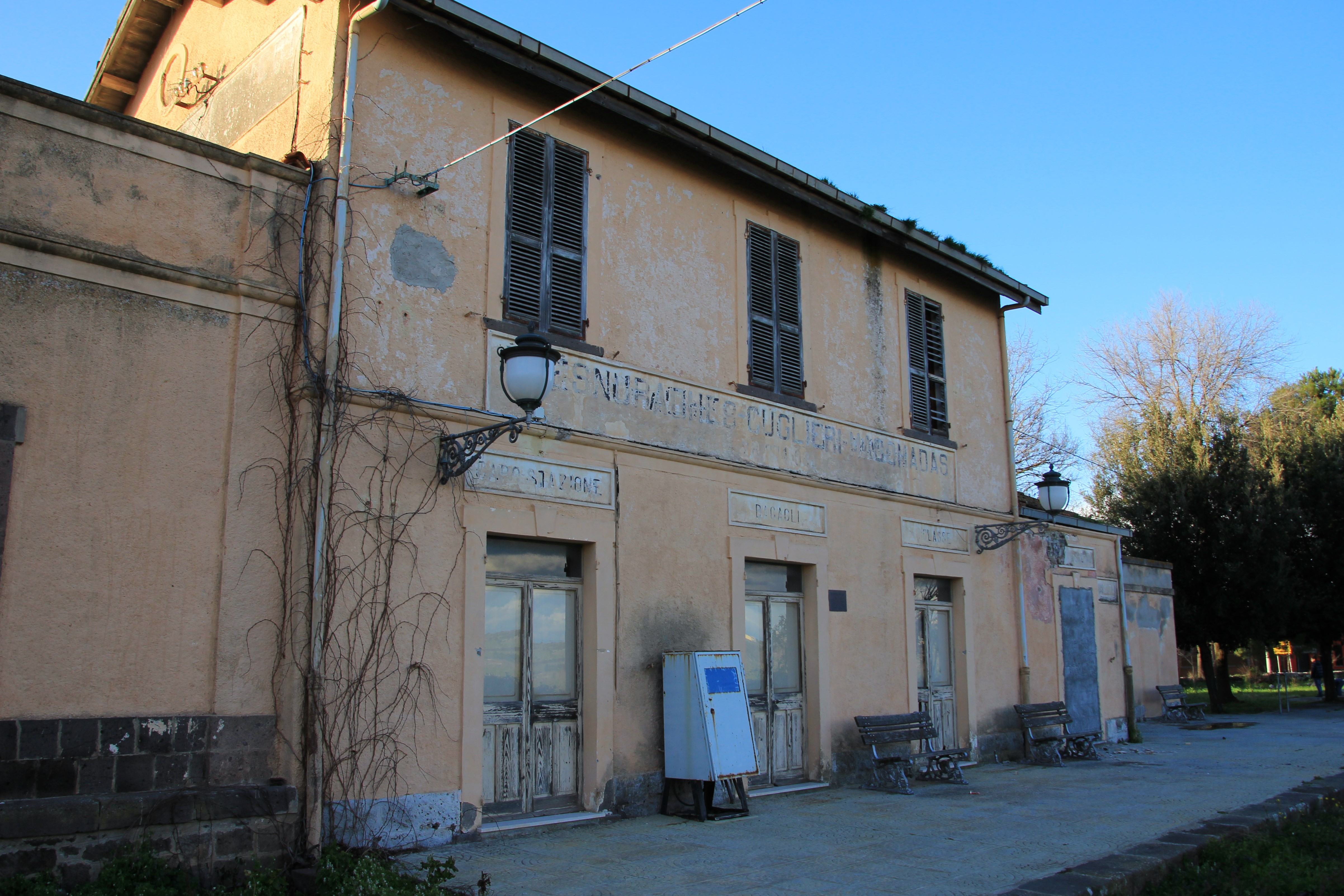 Tresnuraghes, stazione ferroviaria